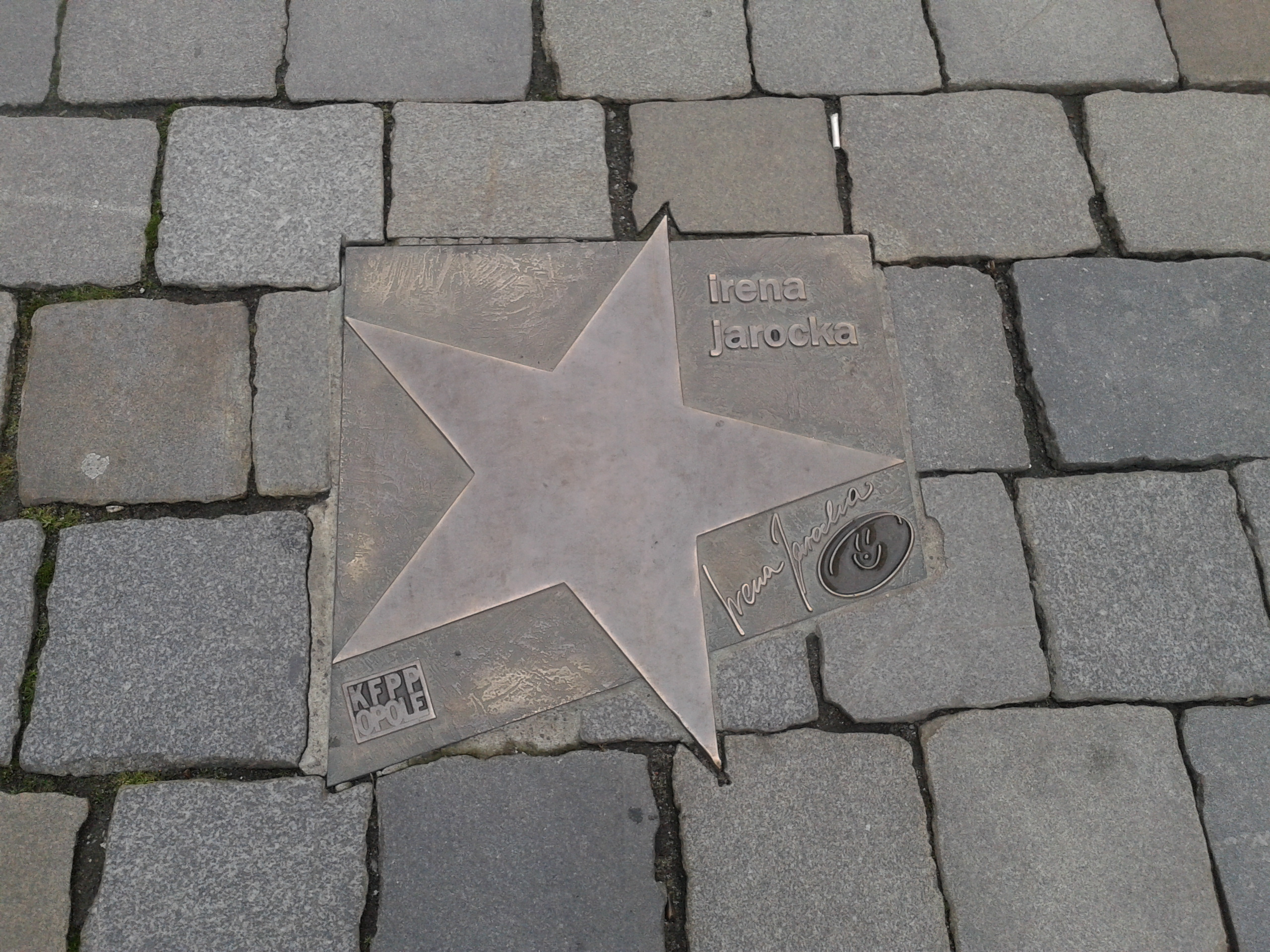 Gwiazda Jarockiej w Alei Gwiazd Polskiej Piosenki w Opolu.